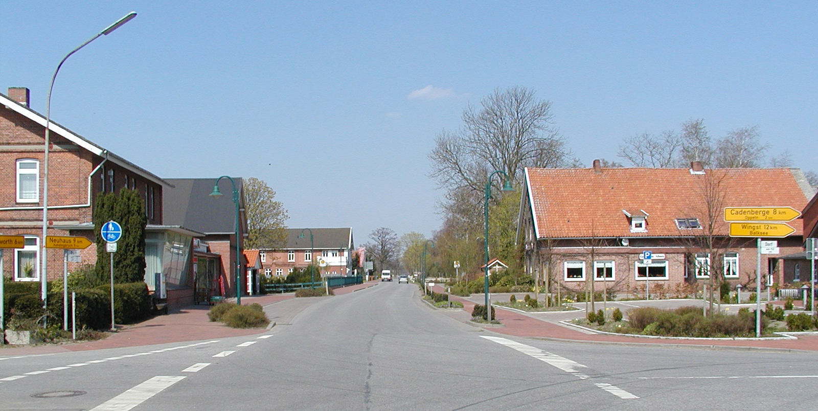 Bülkau: Die Dorfstraße im Dorf Richtung Nord